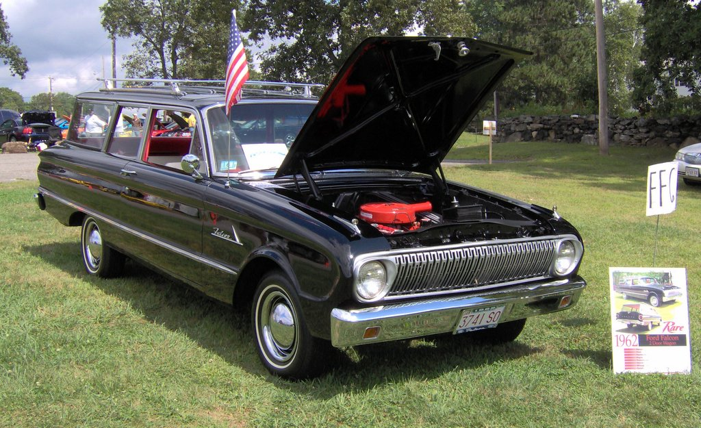 1962 Ford Falcon 2-door wagon